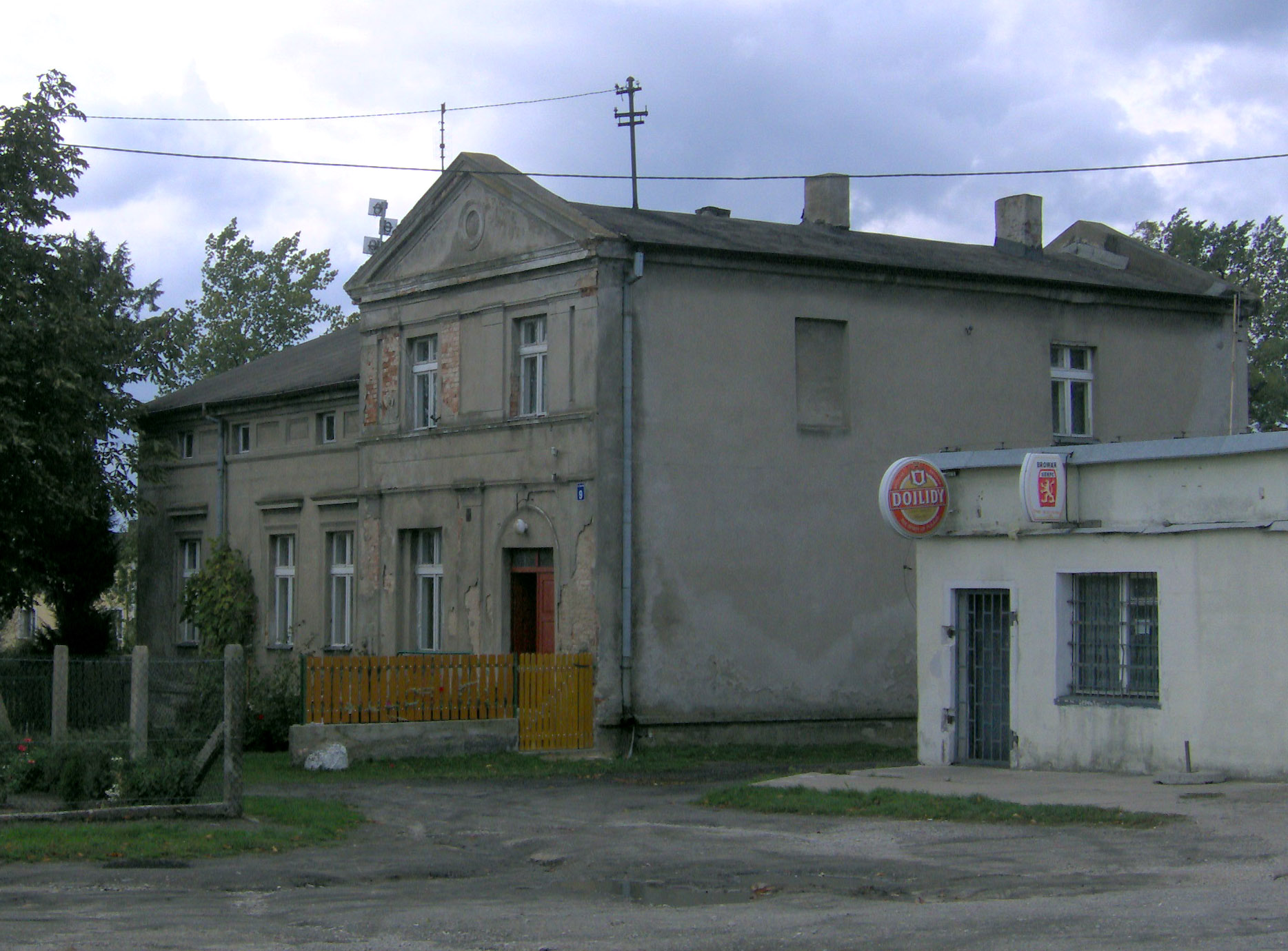 Dwór w Dębinach